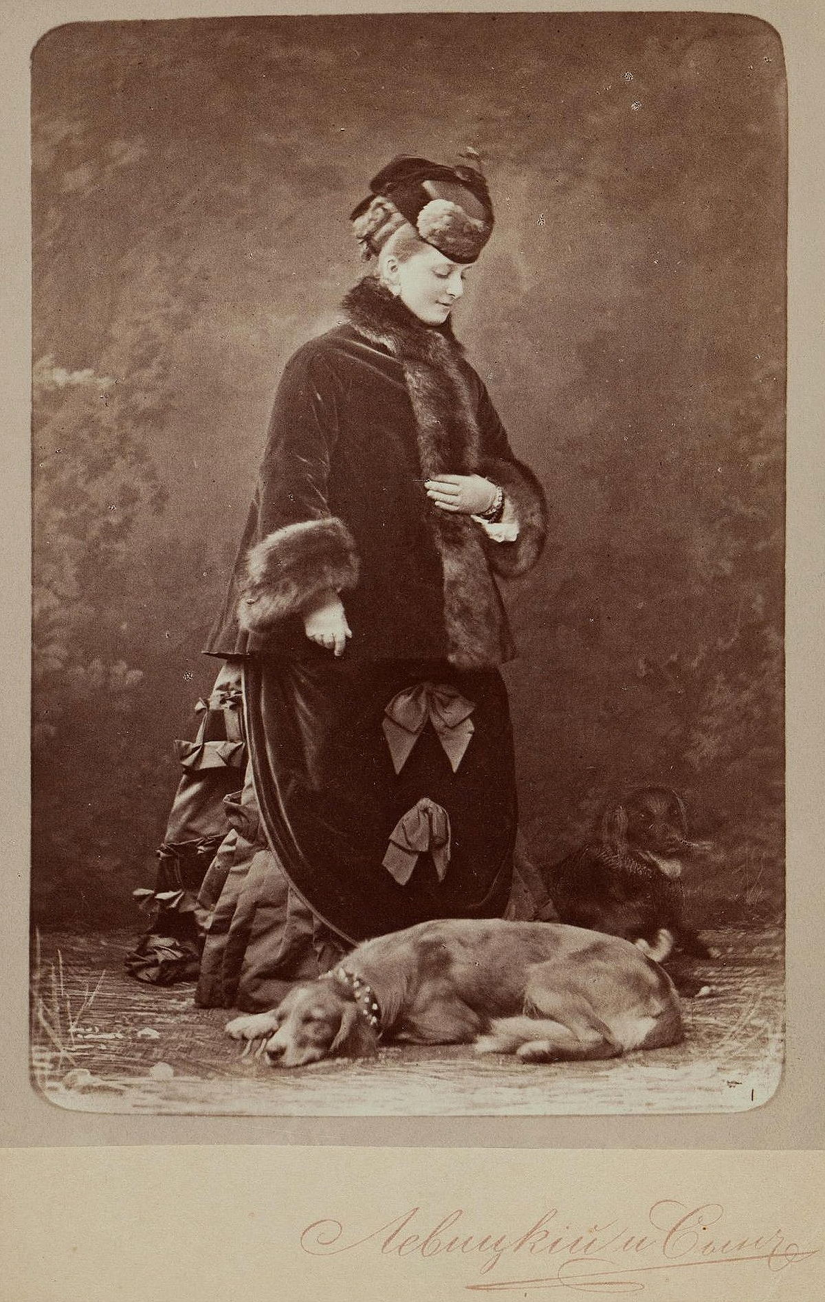 Сергей Львович Левицкий (1819–1898) Портрет княжны Екатерины Михайловны Долгоруковой. 1872–1873 гг.